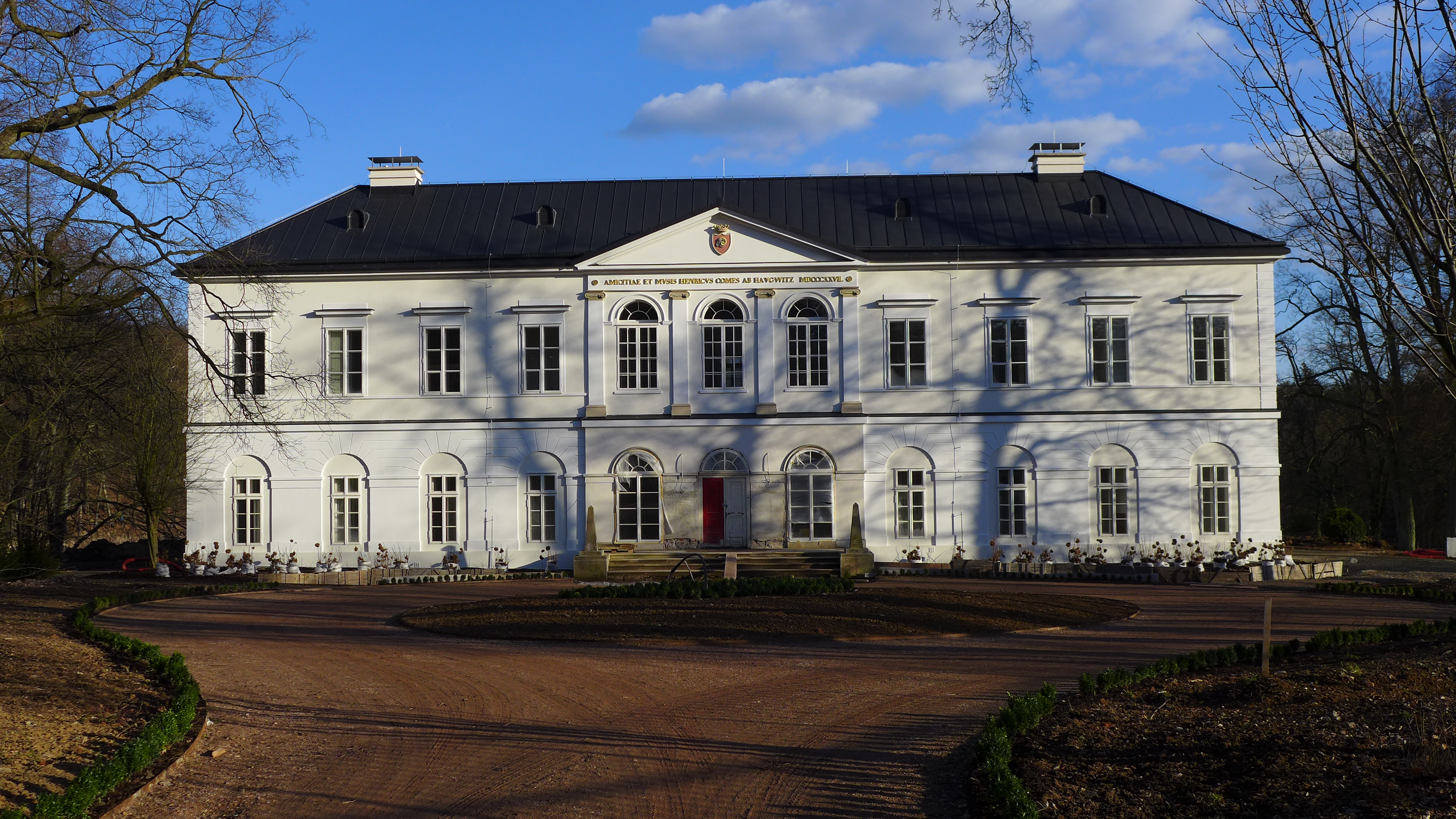 Zámek Jinošov, Jinošov 63